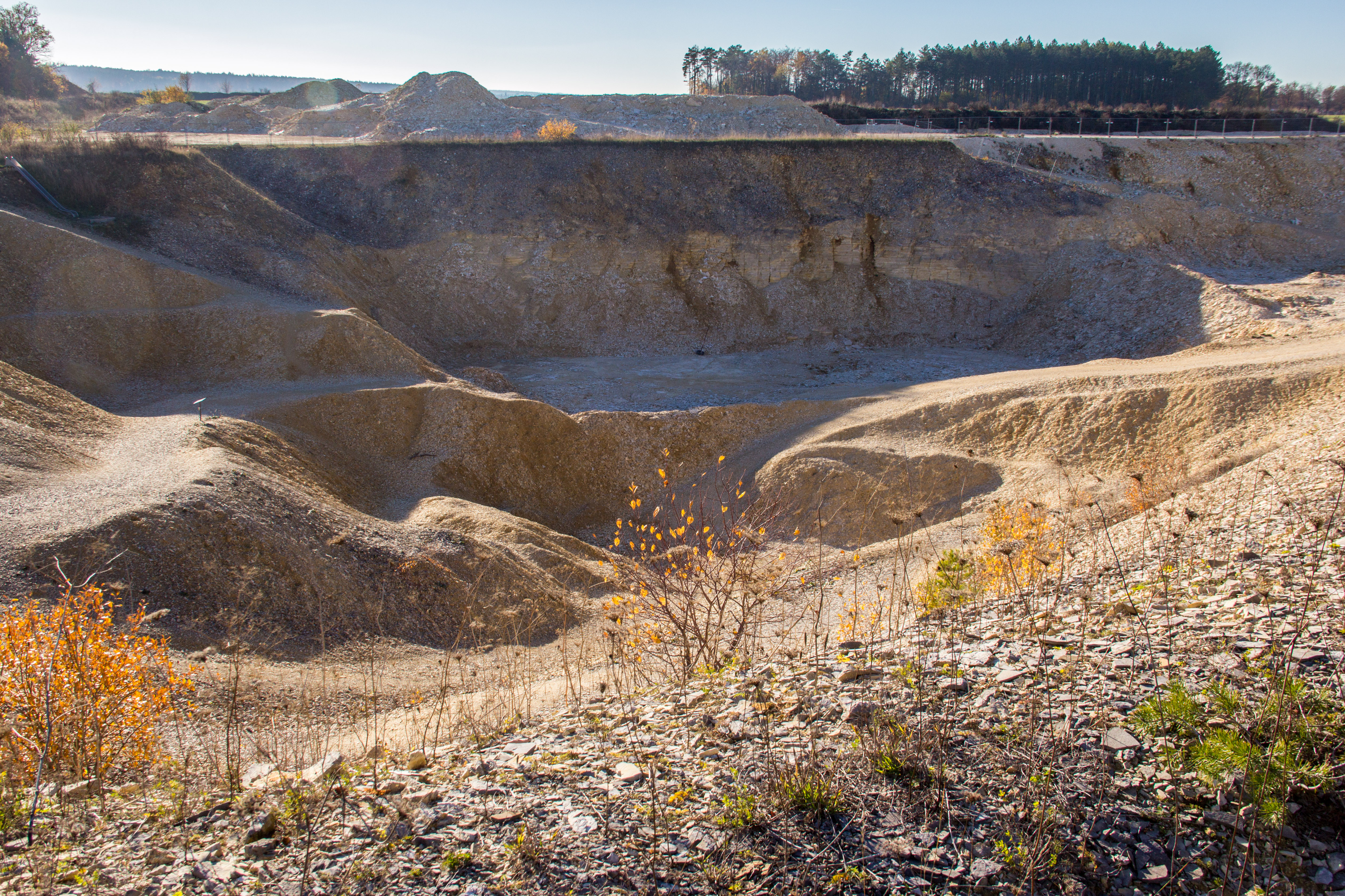 Sammlersteinbruch am Blumenberg W von Eichstätt, Eichstätt, Geotop